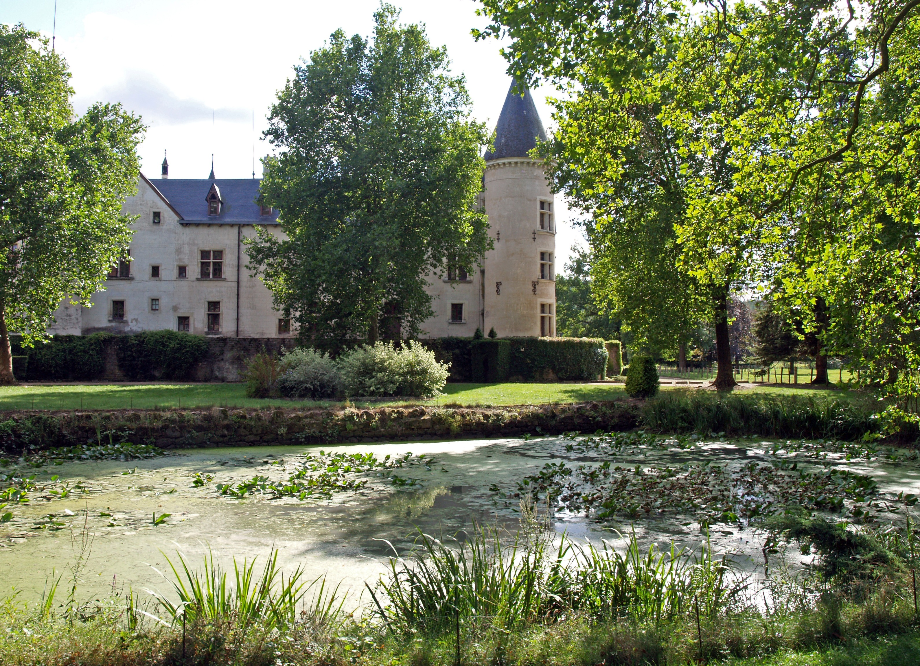 Façade sud-ouest du château de Bourbilly, en Côte-d'Or.